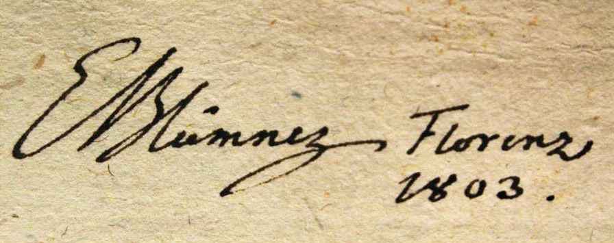 Autogramm von Ernst Blümner während seines Aufenthalts in Italien